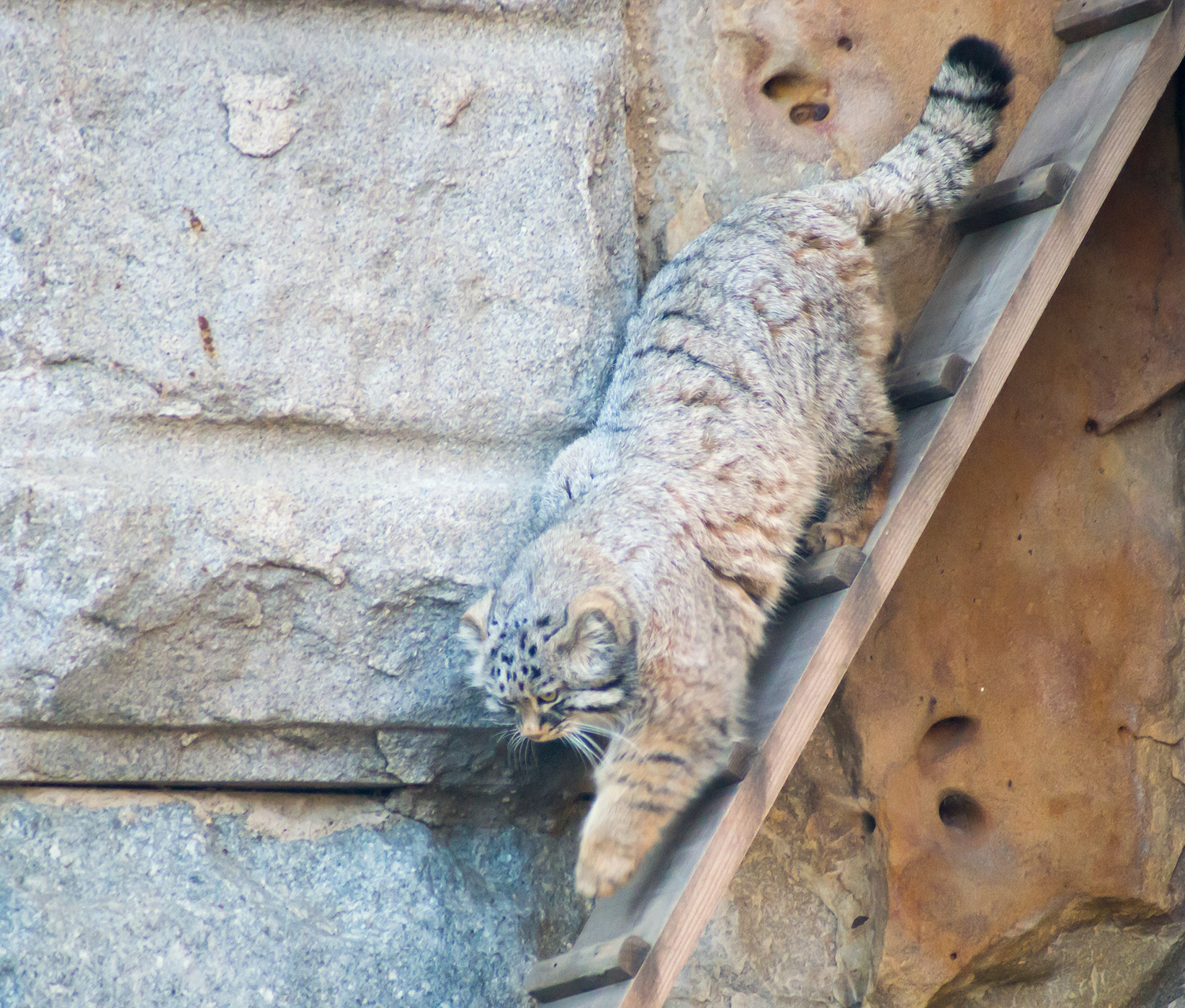 Манул в Московском зоопарке